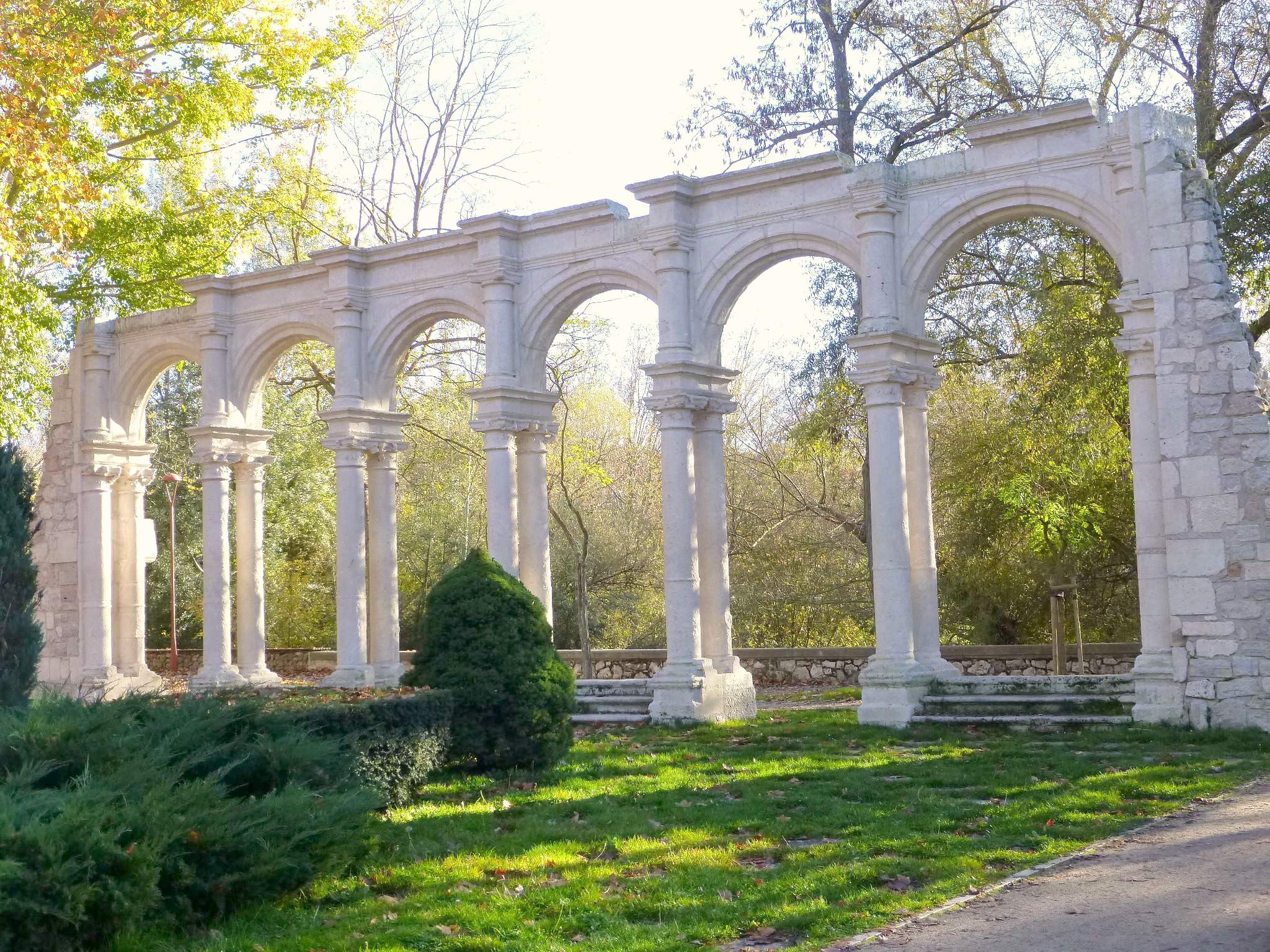 Burgos - Parque de la Isla, Arcos de los Comendadores